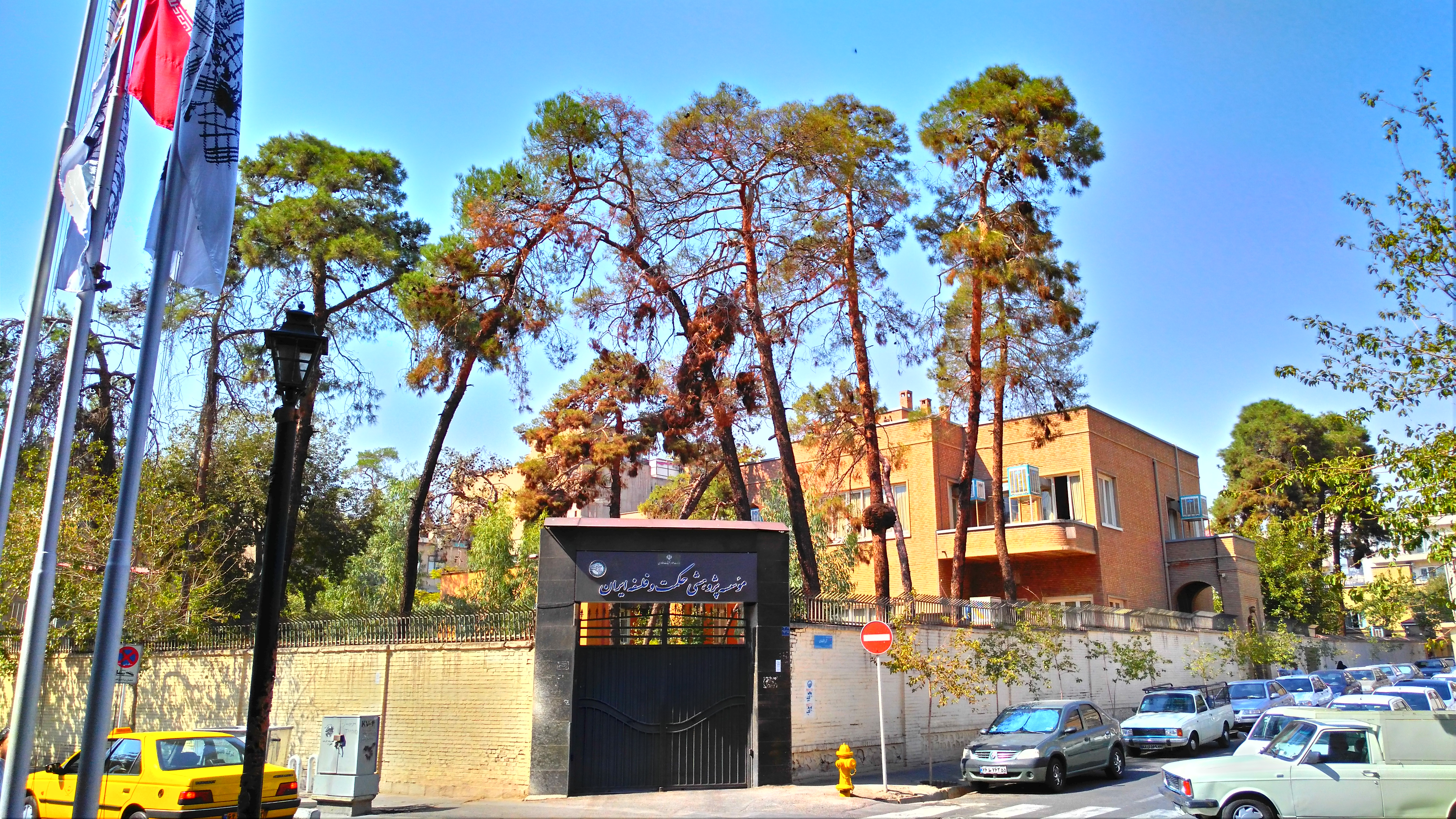 انجمن حکمت وفلسفه ایران